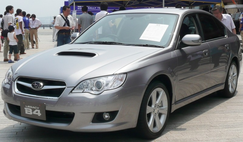 Subaru Legacy B4 2.0GT (BL5)